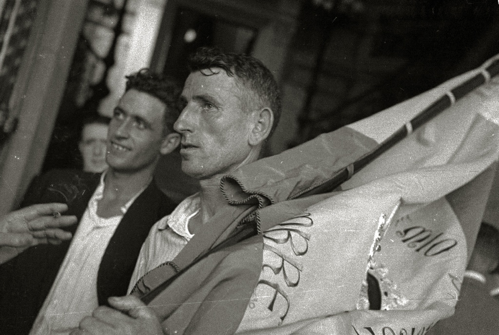 Título original: Escena de la Bandera de la Concha (12/15) Localización: San Sebastián (Guipúzcoa)